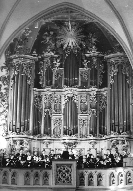 3.10.90 Berlin: Vereinigung- Ein zentraler ökumenischer Gottesdienst unter dem Leitwort "Nehmt einander an" fand in der Ostberliner Marienkirche statt. Mit dem Gottesdienst feierten die christlichen Kirchen in Deutschland den Tag der deutschen Einheit. Information added by Wikimedia users.Der Staats- und Domchor Berlin auf der Orgelempore der Marienkirche unter der Leitung von Christian Grube.